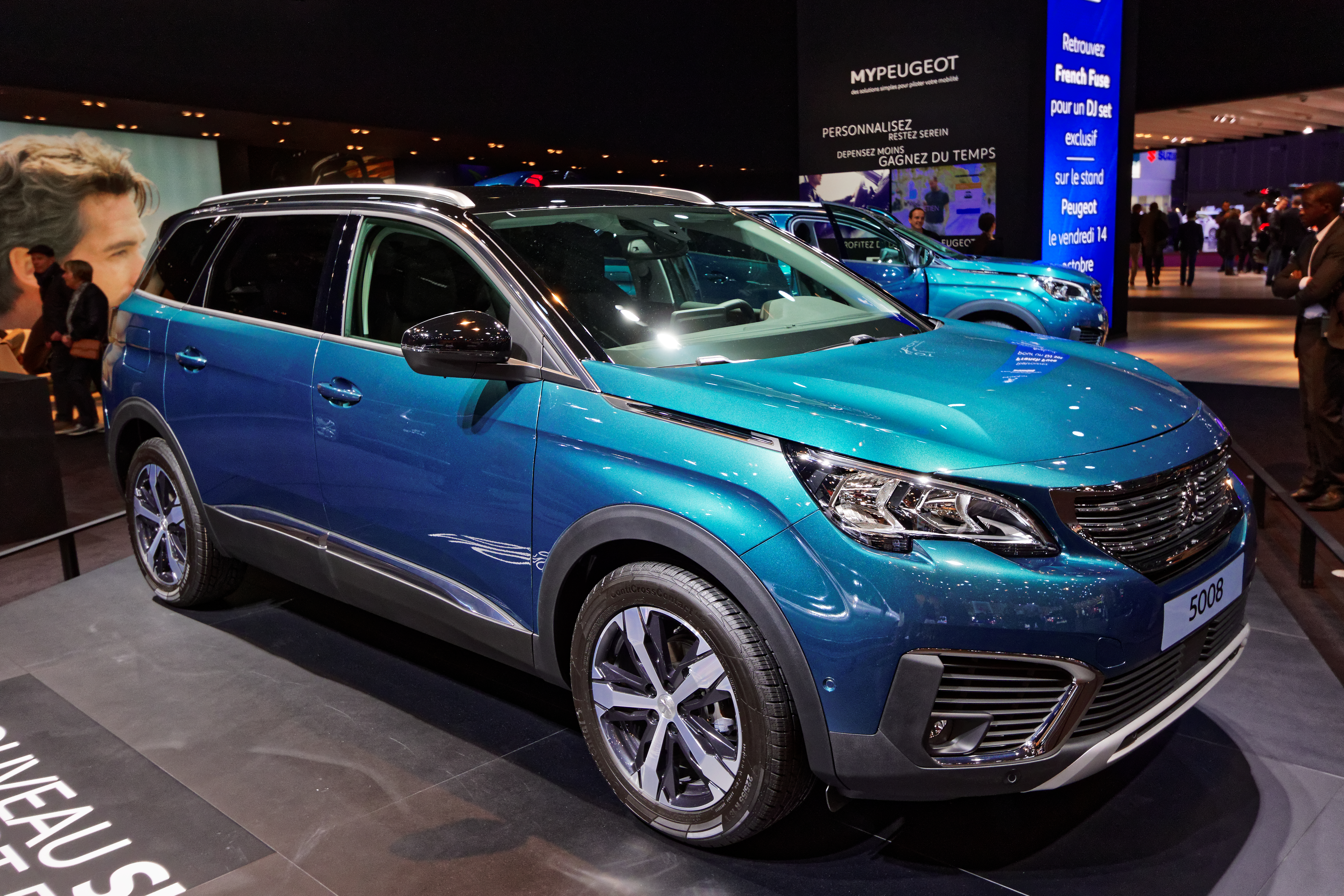 Une Peugeot 5008 présentée lors du mondial de l'automobile de Paris 2016.